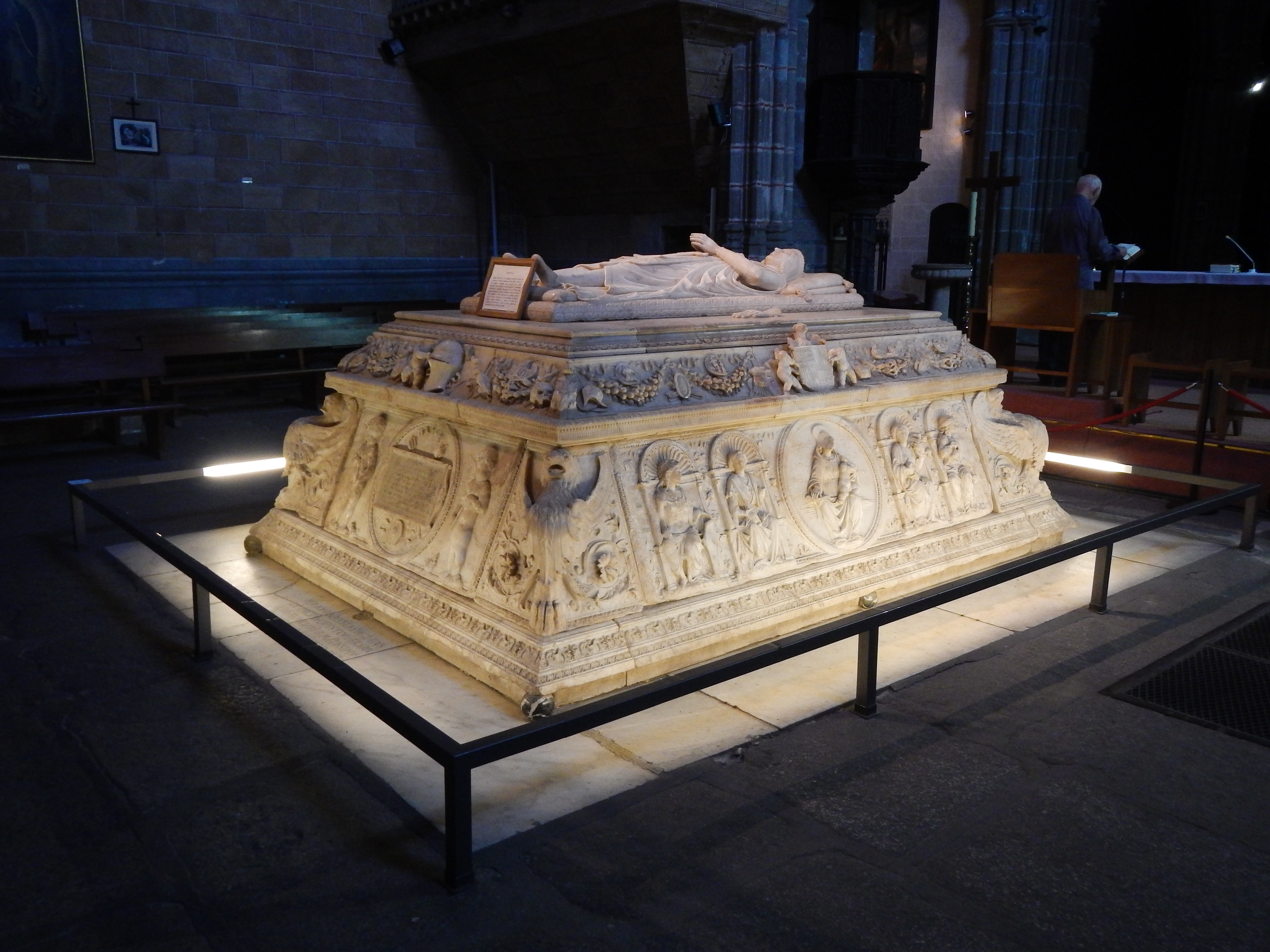 Tumba de Juan Primero hijo de los Reyes Católicos en Monasterio de Santo Tomás en Ávila